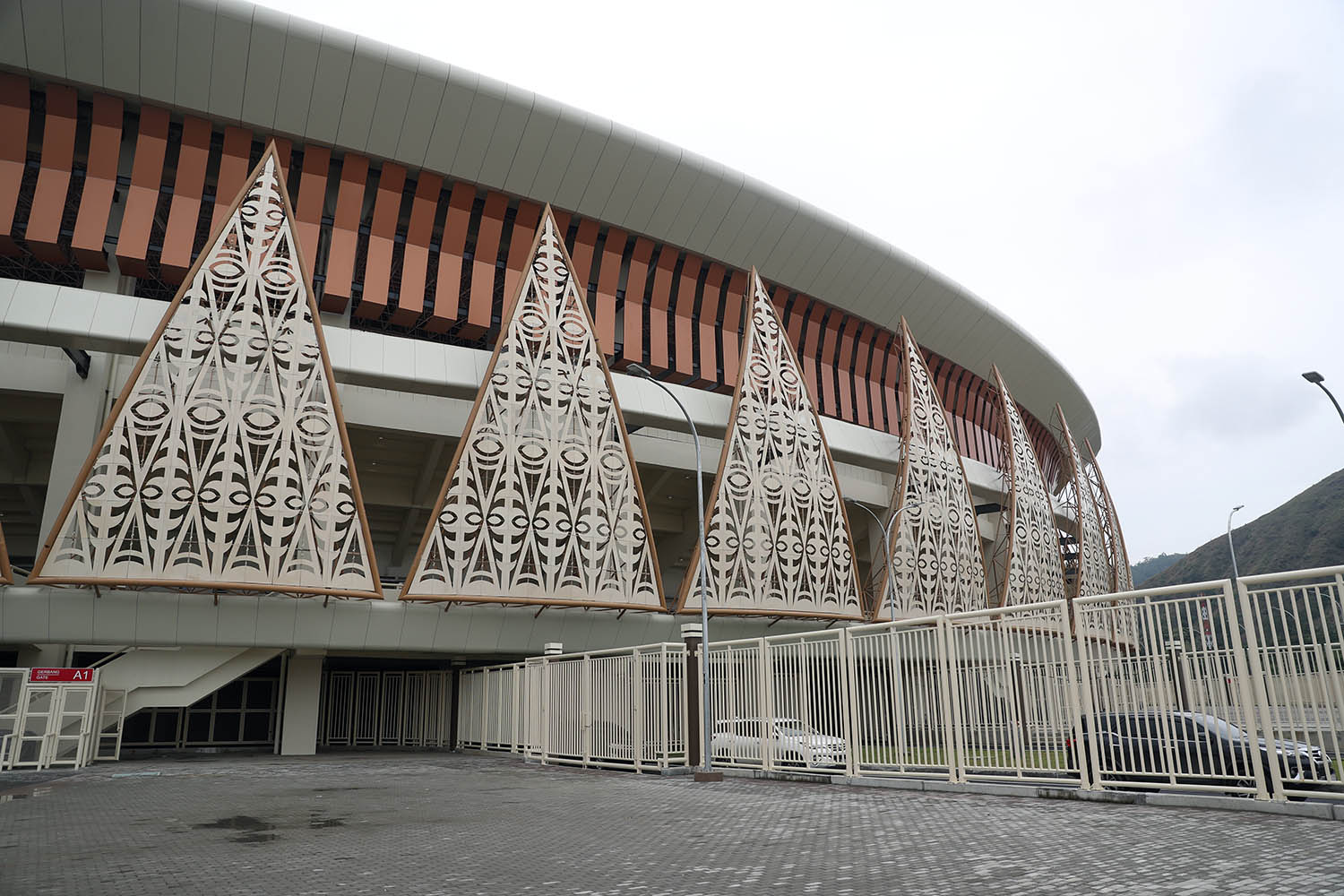 Stadion Utama Papua Bangkit (depan)